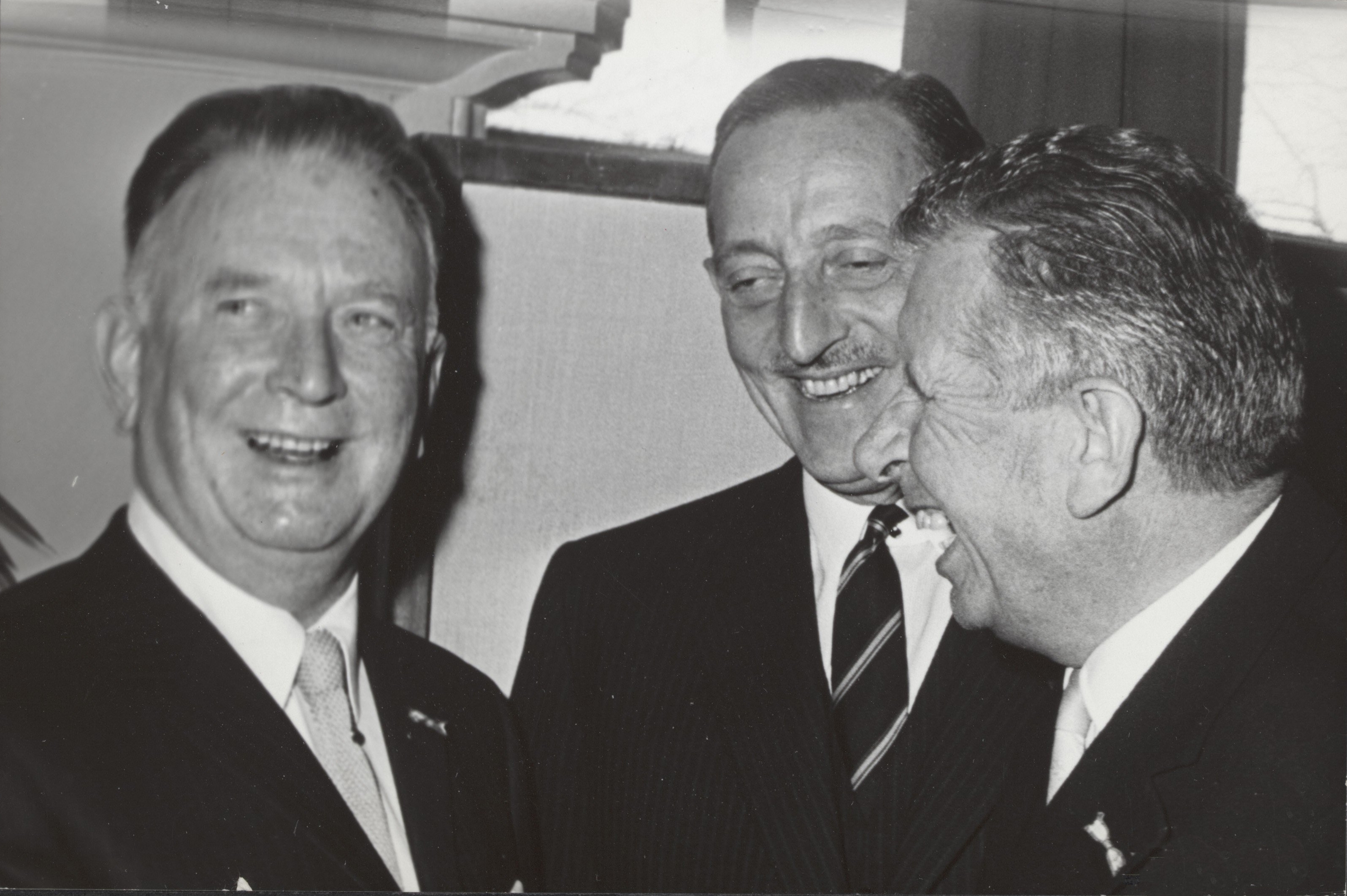 Collectie / Archief : Fotocollectie Elsevier Reportage / Serie : [ onbekend ] Beschrijving : Directeur van het Olympisch stadion Dick Bessem neemt afscheid in het restaurant van het stadion. Rechts de voorzitter van Feyenoord Kieboom en de directeur van het Feyenoord Stadion de heer Van Nass Datum : 31 maart 1967 Trefwoorden : afscheid, directeuren Persoonsnaam : Bessem Dick Instellingsnaam : Olympisch Stadion Fotograaf : Merk, Ben / Anefo Auteursrechthebbende : Nationaal Archief Materiaalsoort : Foto (zwart/wit) Nummer archiefinventaris : bekijk toegang 2.24.05.02 Bestanddeelnummer : 042-0126